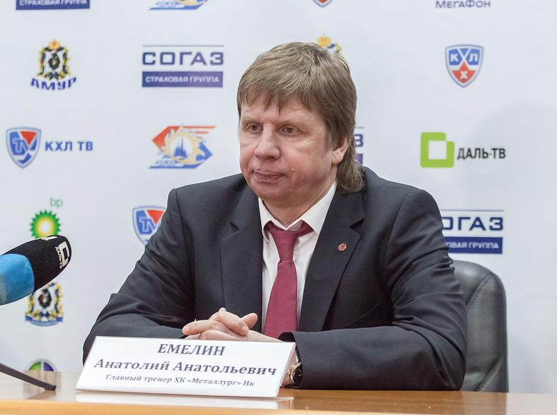 Главный тренер новокузнецкого «Металлурга» Анатолий Емелин на пресс-конференции после матча Кубка Надежды против хабаровского «Амура» 26 февраля 2013 года.